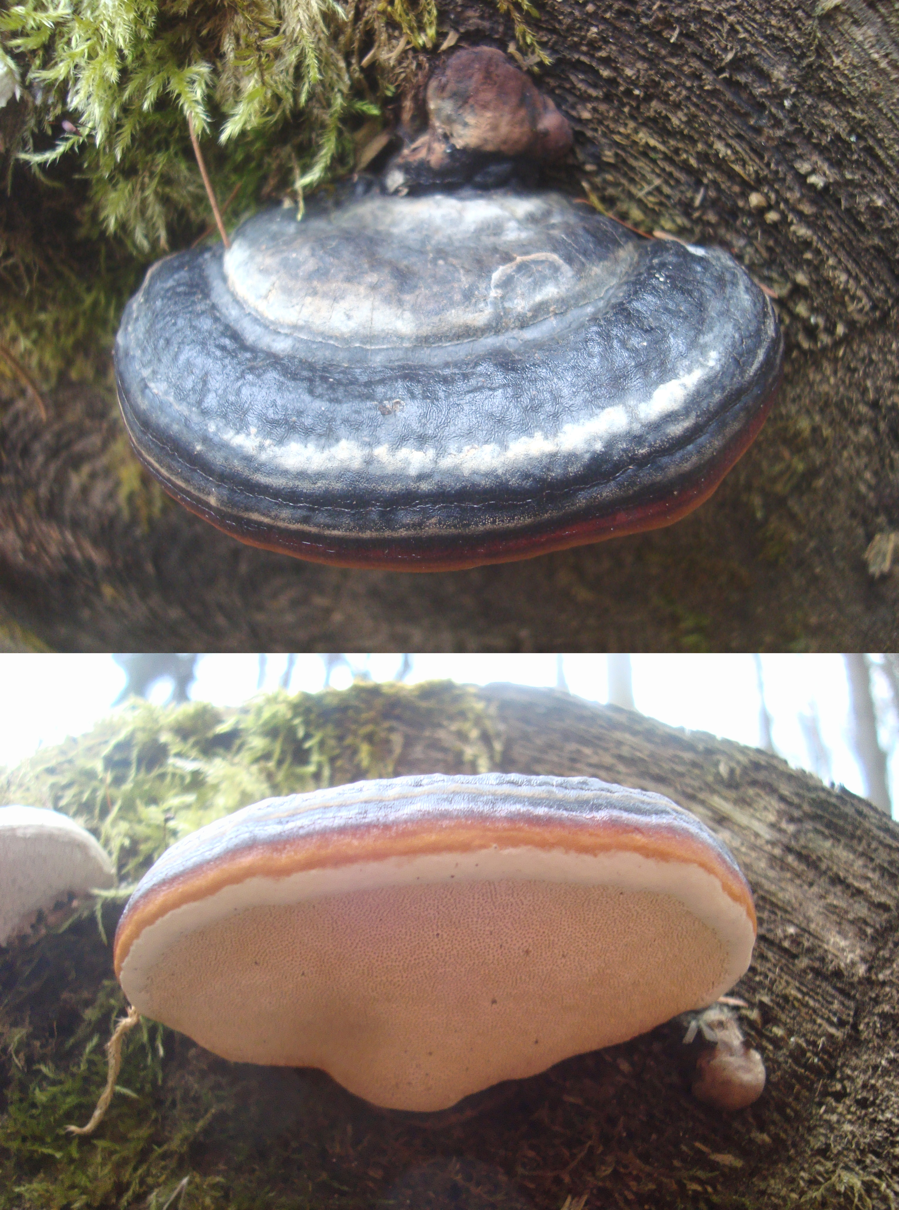 Houba troudnatec růžový z Podkomorských lesů, Česká republika, jižní Morava